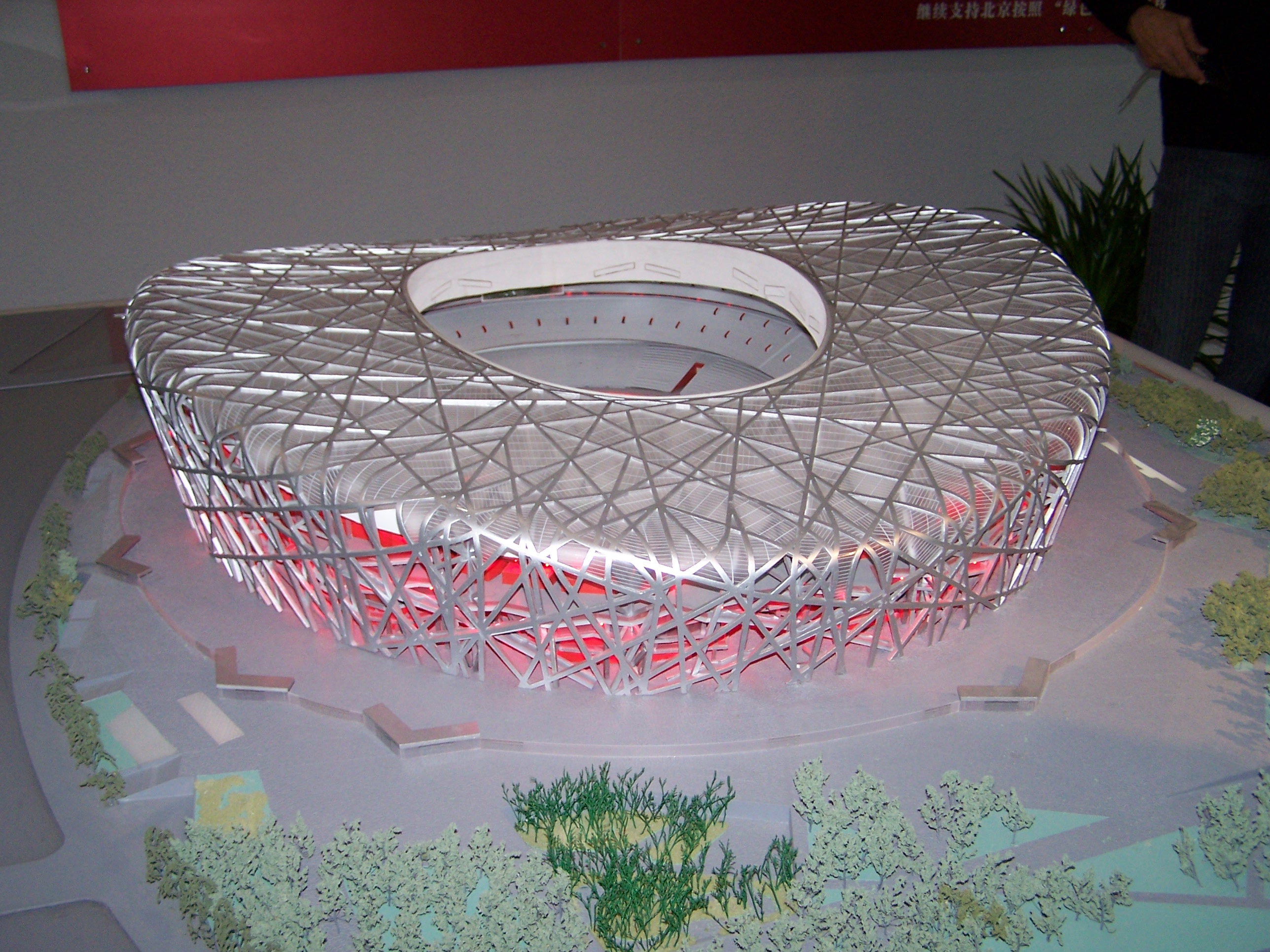 Stade national olympique, Beijing (maquette)